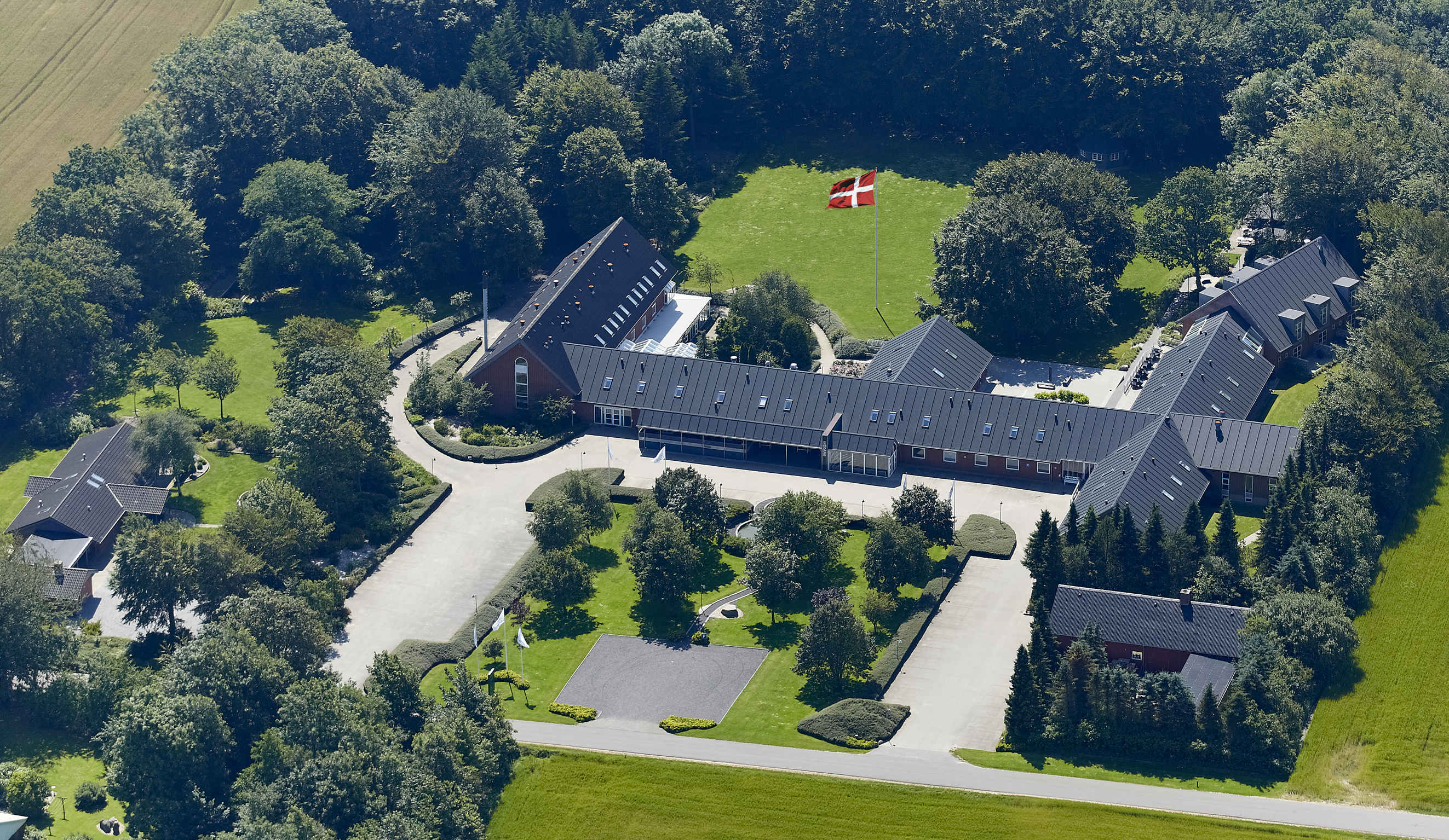 Luftfoto af Laugesens Have 2015